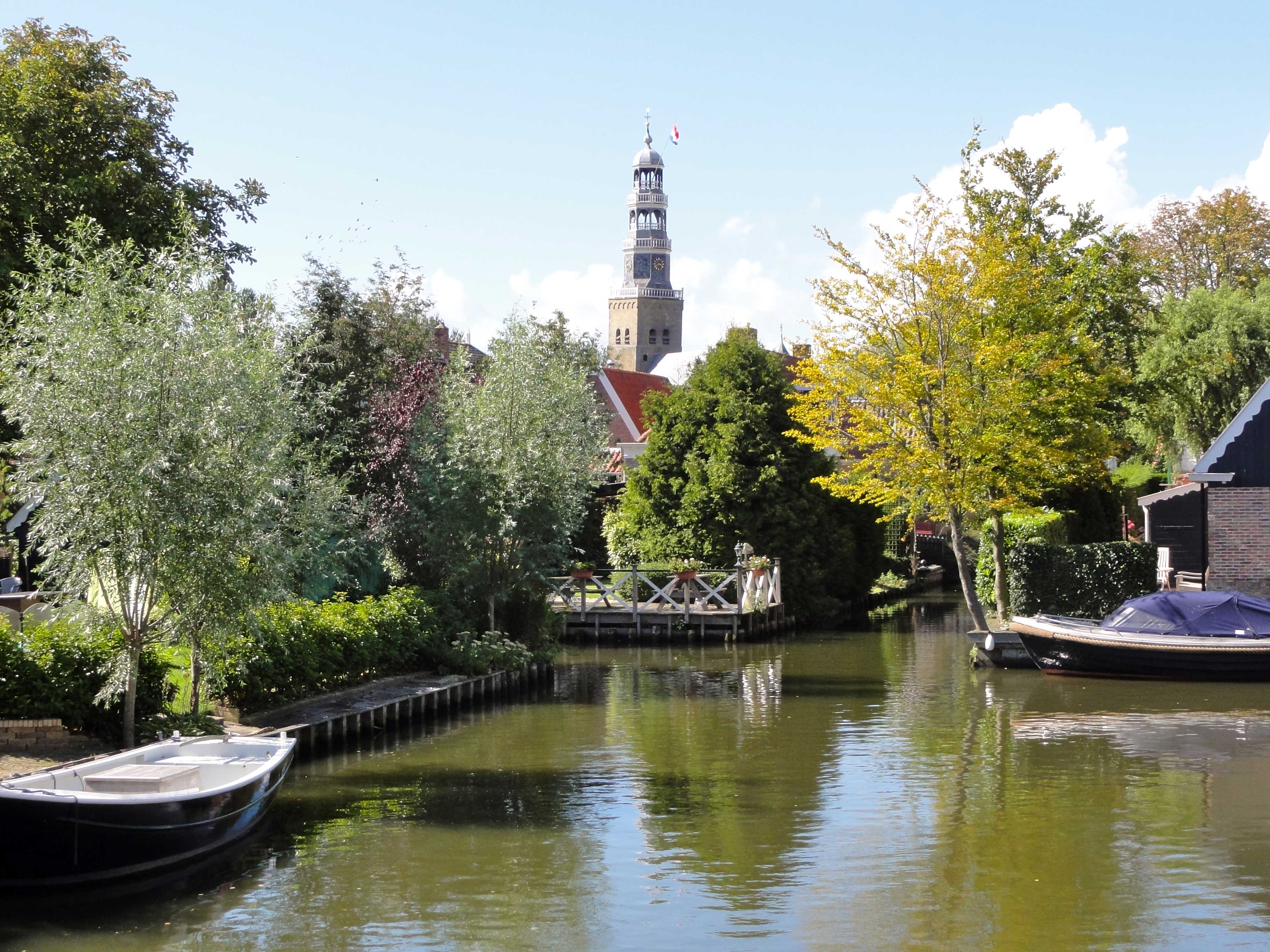 Zicht op Hindeloopen vanaf de Indijksbrug. Links de Grote kerk.